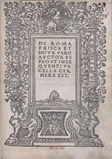 De Roma prisca et noua varii auctores, 1523, titulus